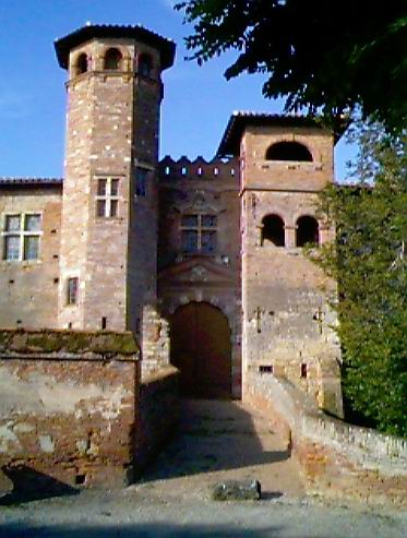 Chateau de Tarabel